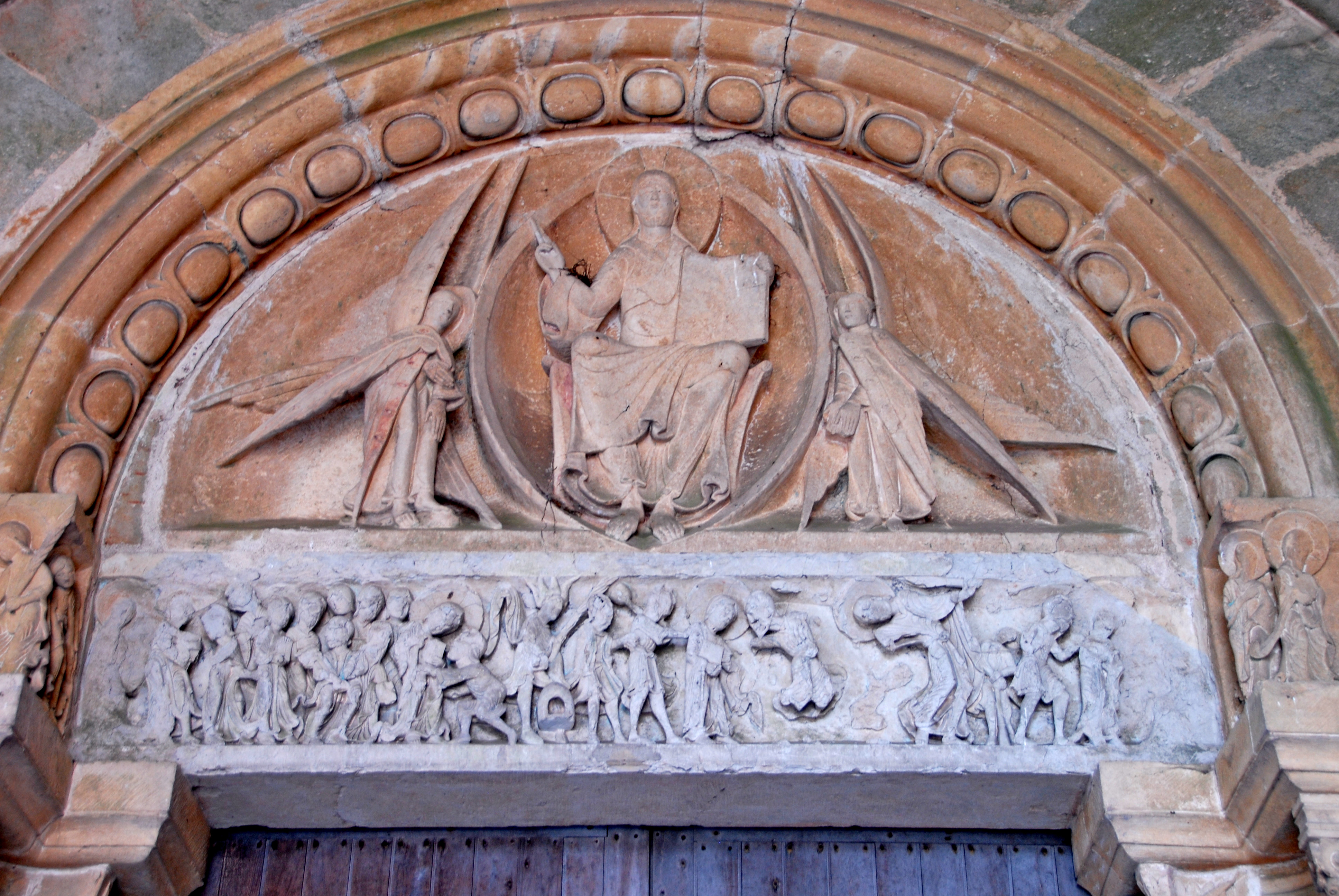 Portal, Tympanon und Architrav